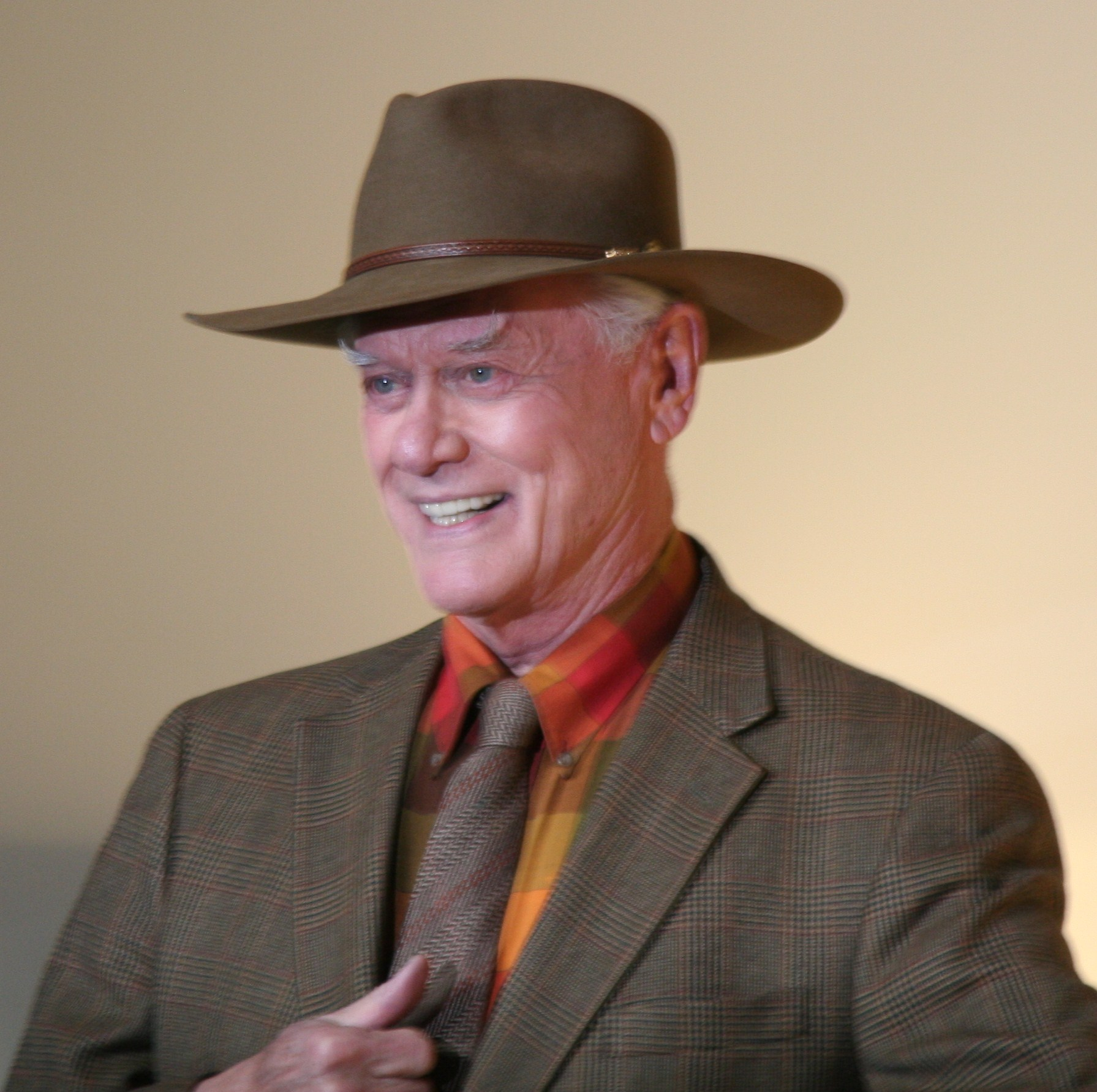 Larry Martin Hagman wurde am 21. September 1931 in Weatherford (Texas) als Sohn des berühmten Musical-Stars Mary Martin und des Rechtsanwalts Benjamin Hagman geboren.